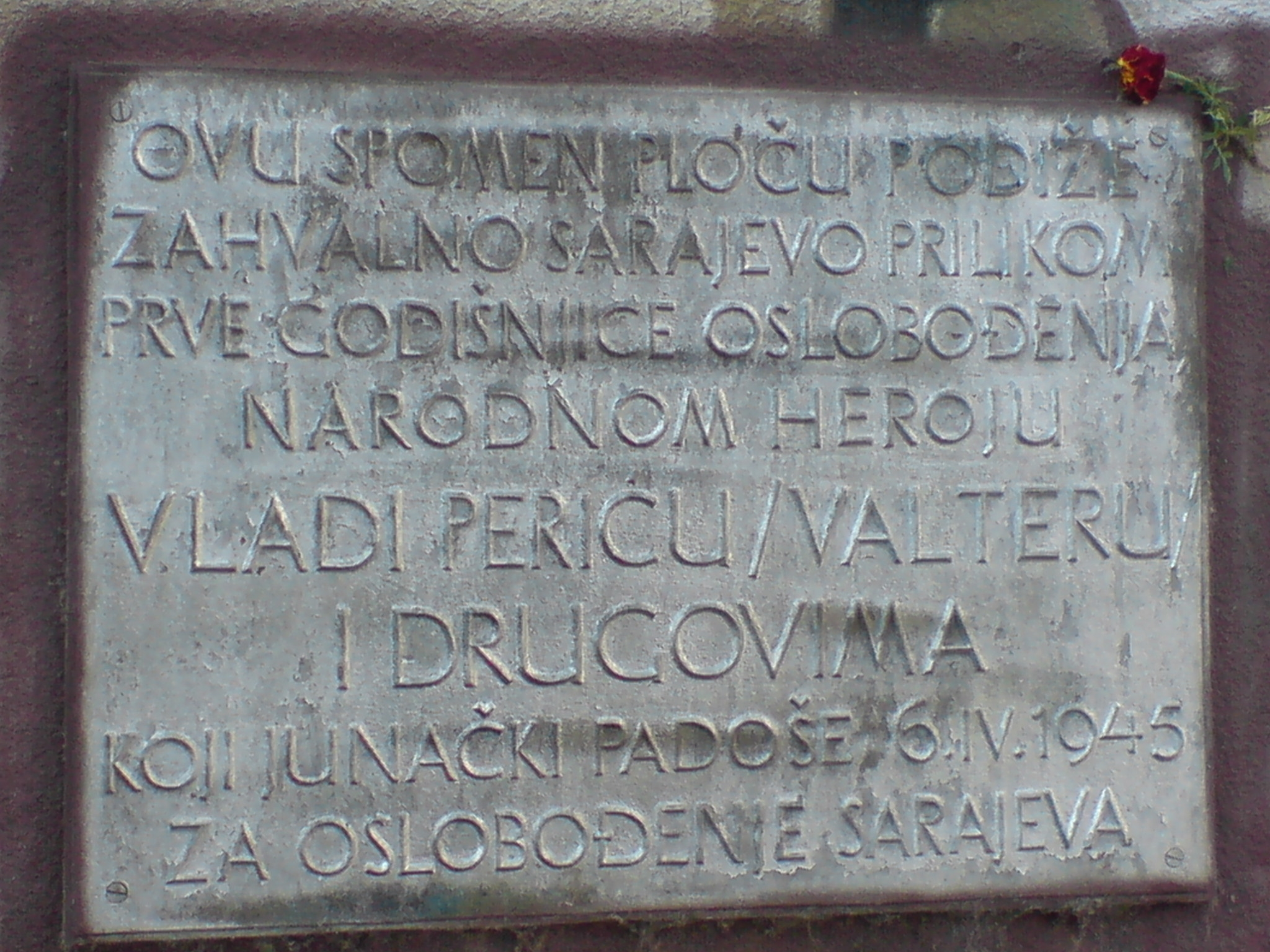 Vladimir "Valter" Perić plaque